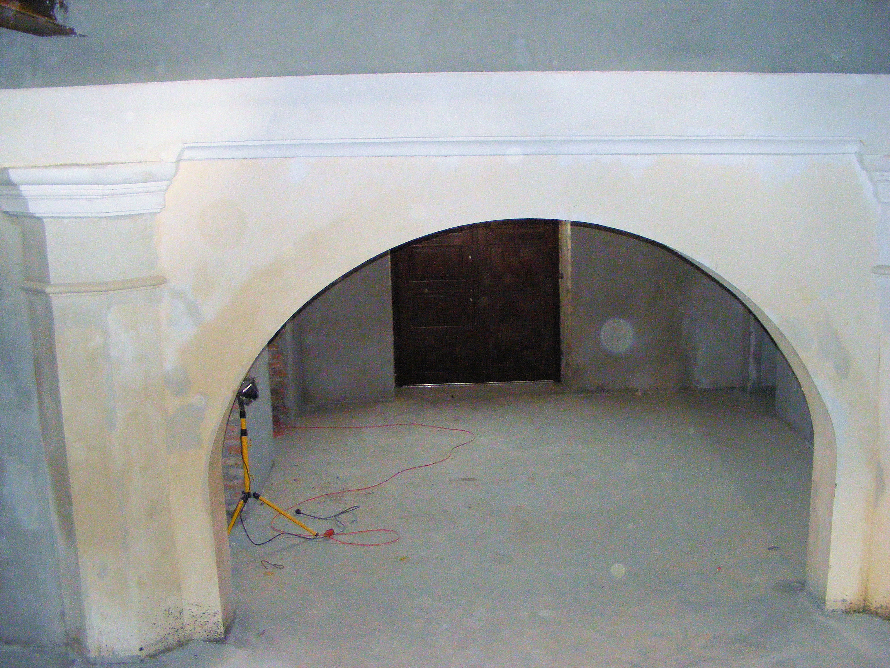 Wnętrze synagogi w Międzyrzeczu